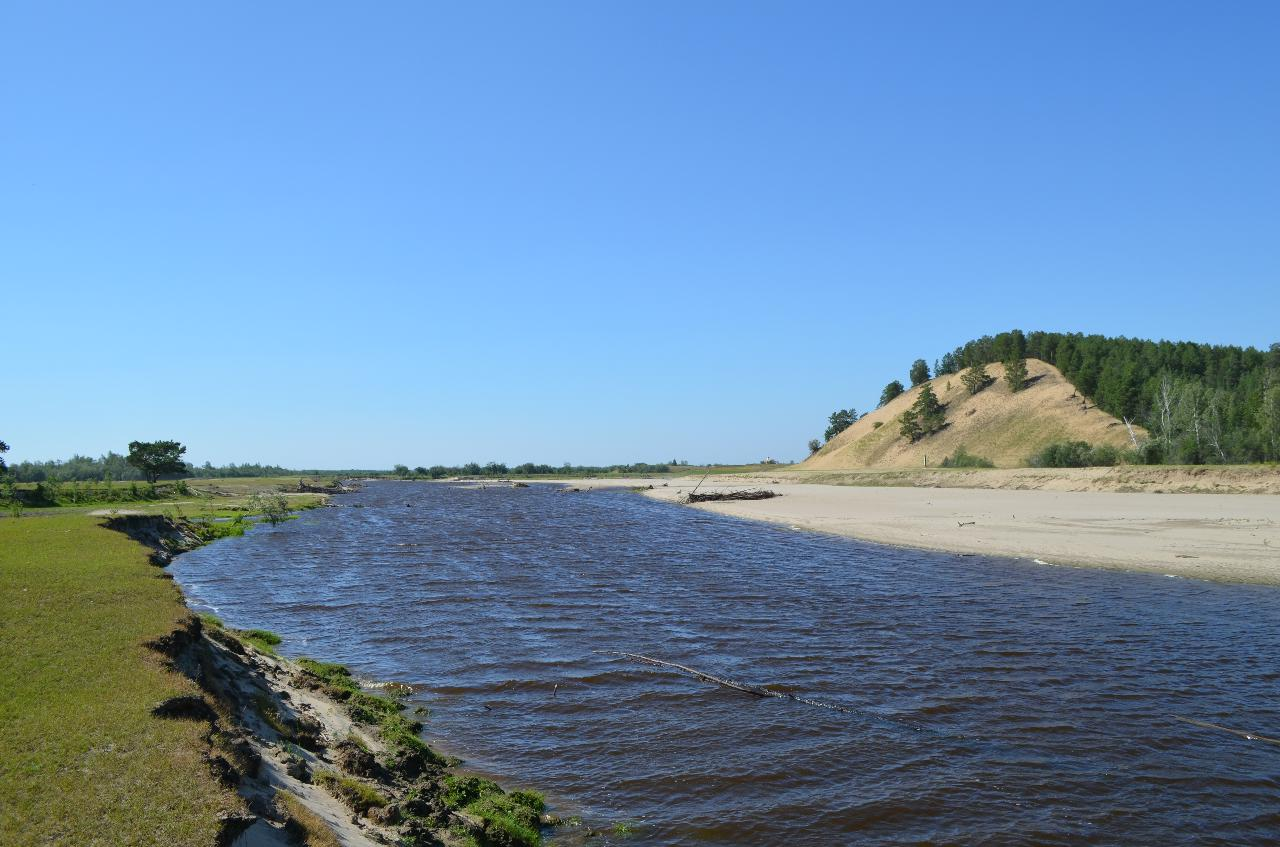 Речка Суола и гора Сууллар Мыраан неподалёку от села Тектюр